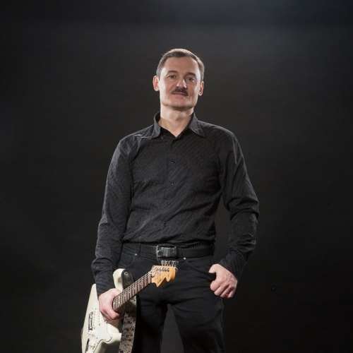 гитара, бэк-вокал